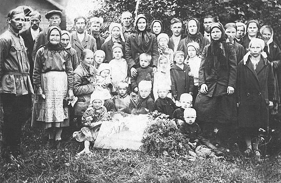 Ингерманландцы депортированные из прихода Вуоле (село Вуолы)